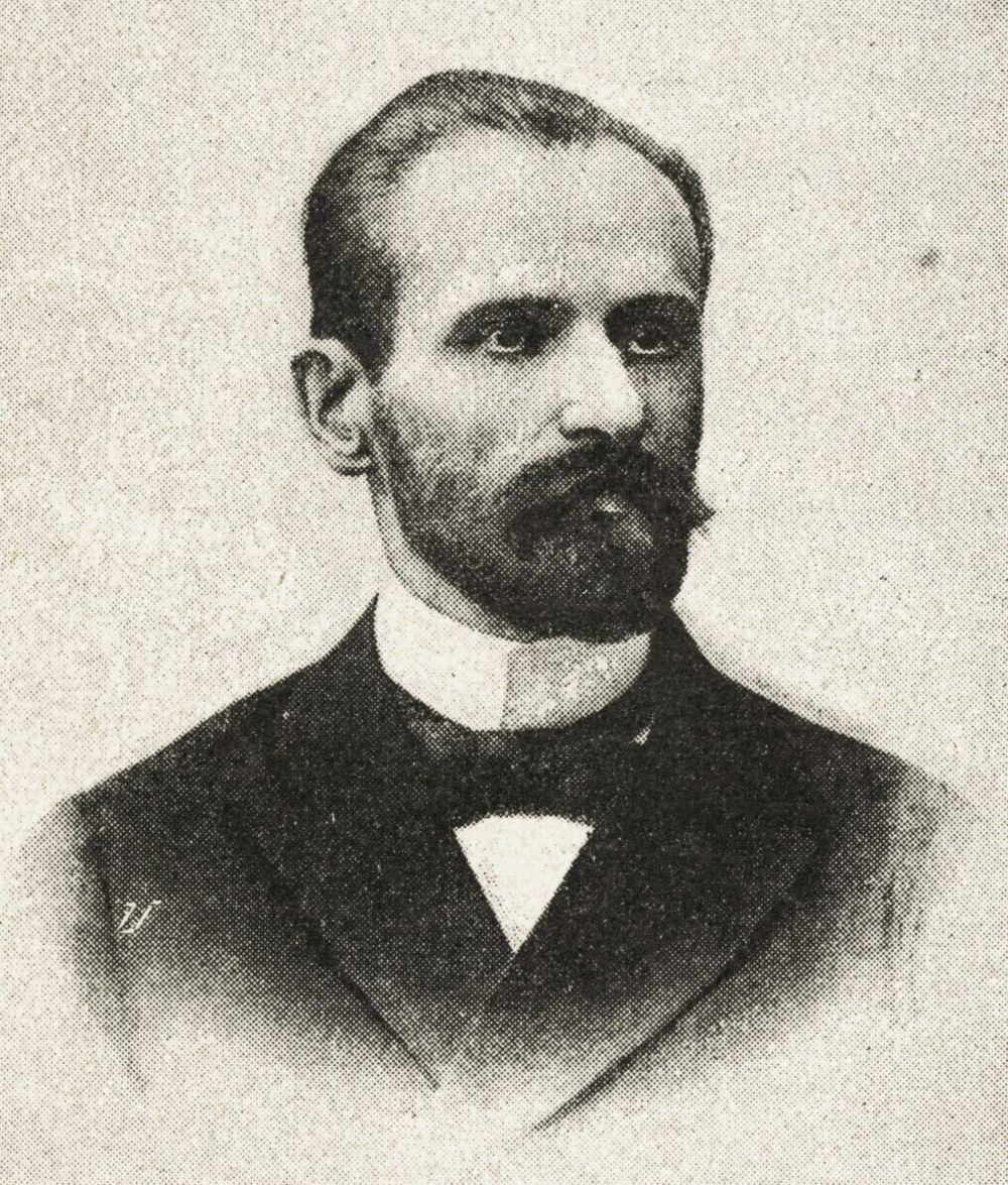 Władysław Holewiński